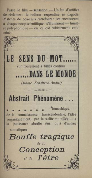 Fac-simile of page 13, Le Pan-pan au cul du nu nègre by Clément Pansaers (1920)